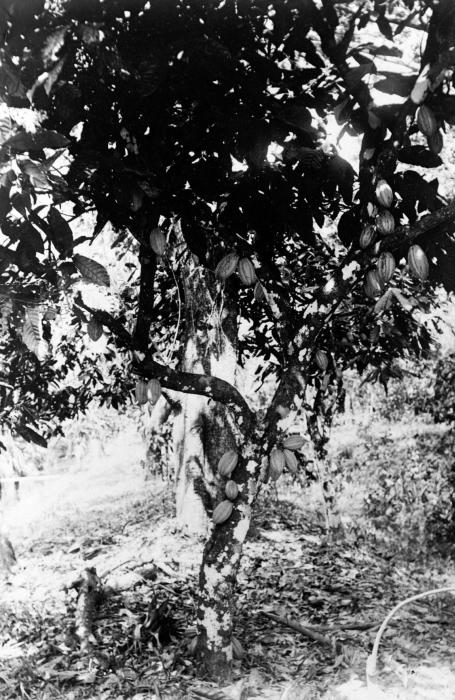 Negatief. Cacaoboom in volle dracht